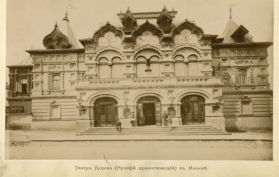 Здание театра Корша в Богословском (ныне Петровском) переулке. Театр строился по рисункам и планам архитектора М. Н. Чичагова. Впервые не только в России, но и заграницей, театр освещался исключительно одним электричеством.